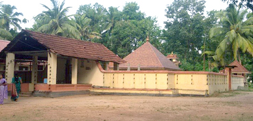 തളിക്കൽ മഹാദേവ ക്ഷേത്രം.